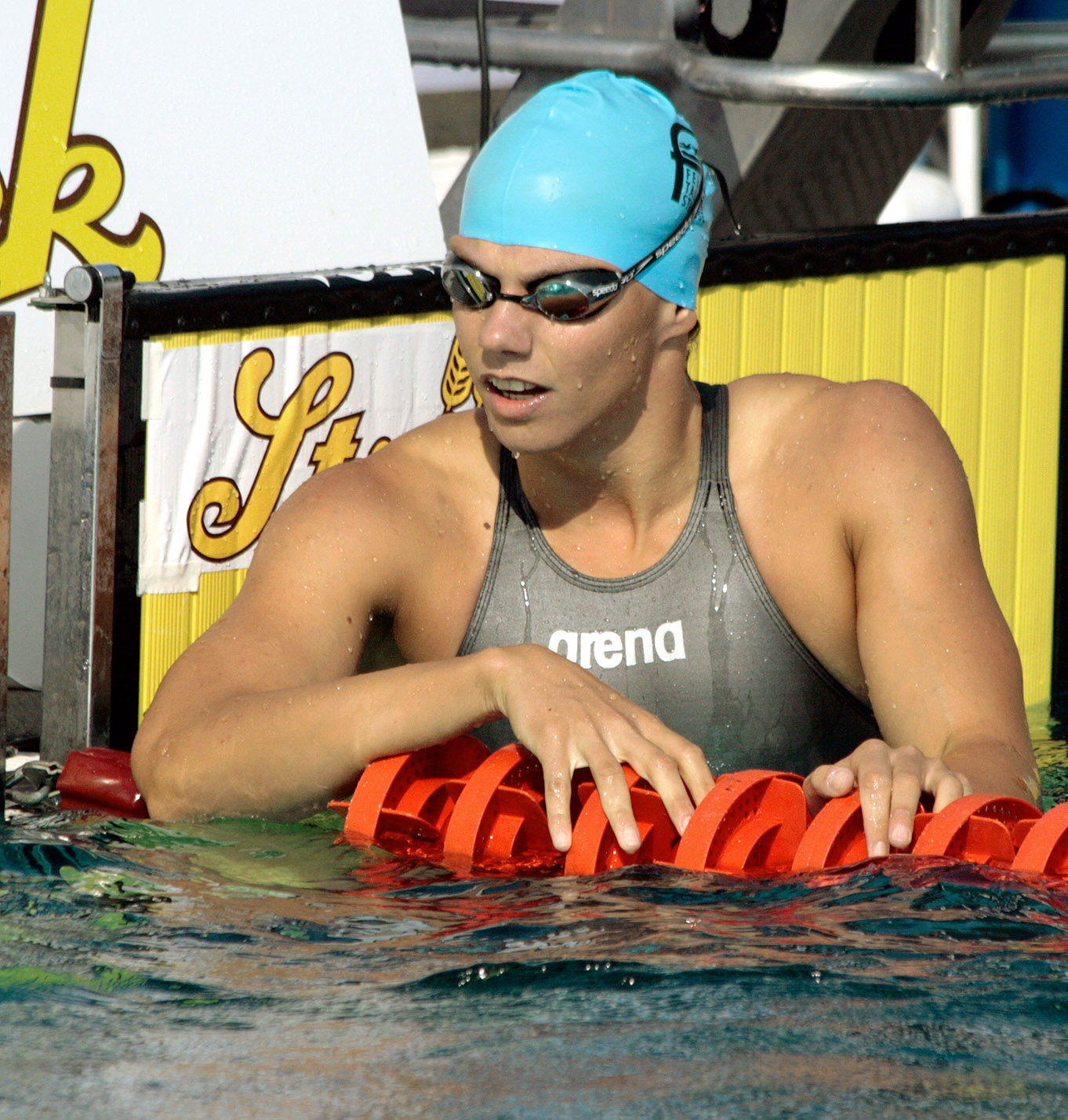 Die Schwimmerin Verena Klocker bei den 64. österreichischen Staatsmeisterschaften 2009 in St. Pölten